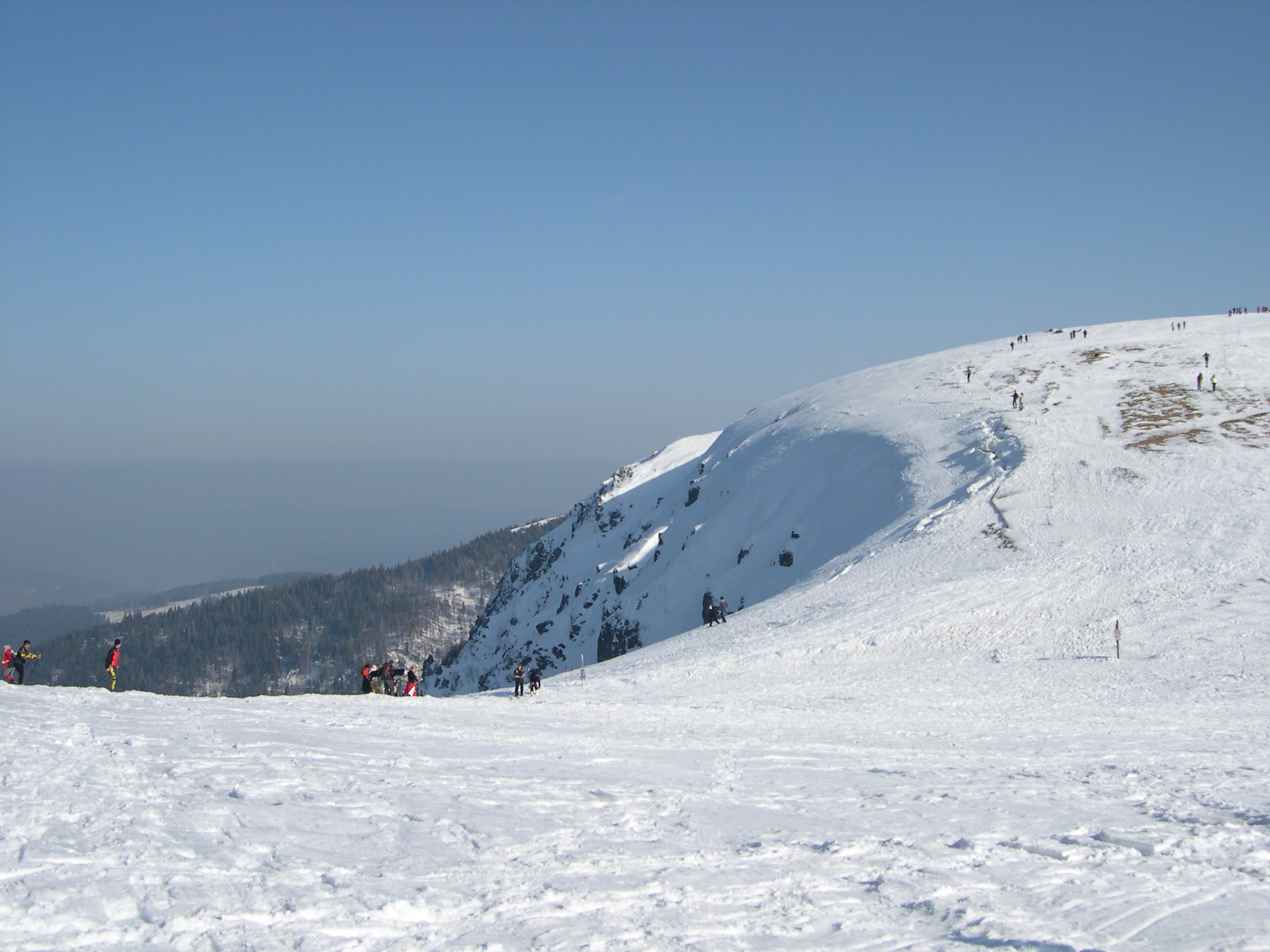 Col et combe du Falimont, sur le flanc N/E du Hohneck, Massif des Vosges, 68 Alsace.